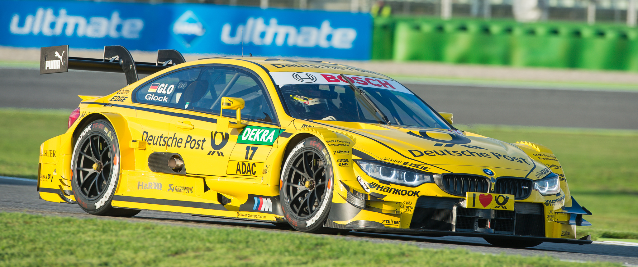 DTM,Deutsche Post BMW M4 DTM,Deutsche Tourenwagen Masters,Hockenheimring,MTEK GmbH,Motorsport,Timo Glock